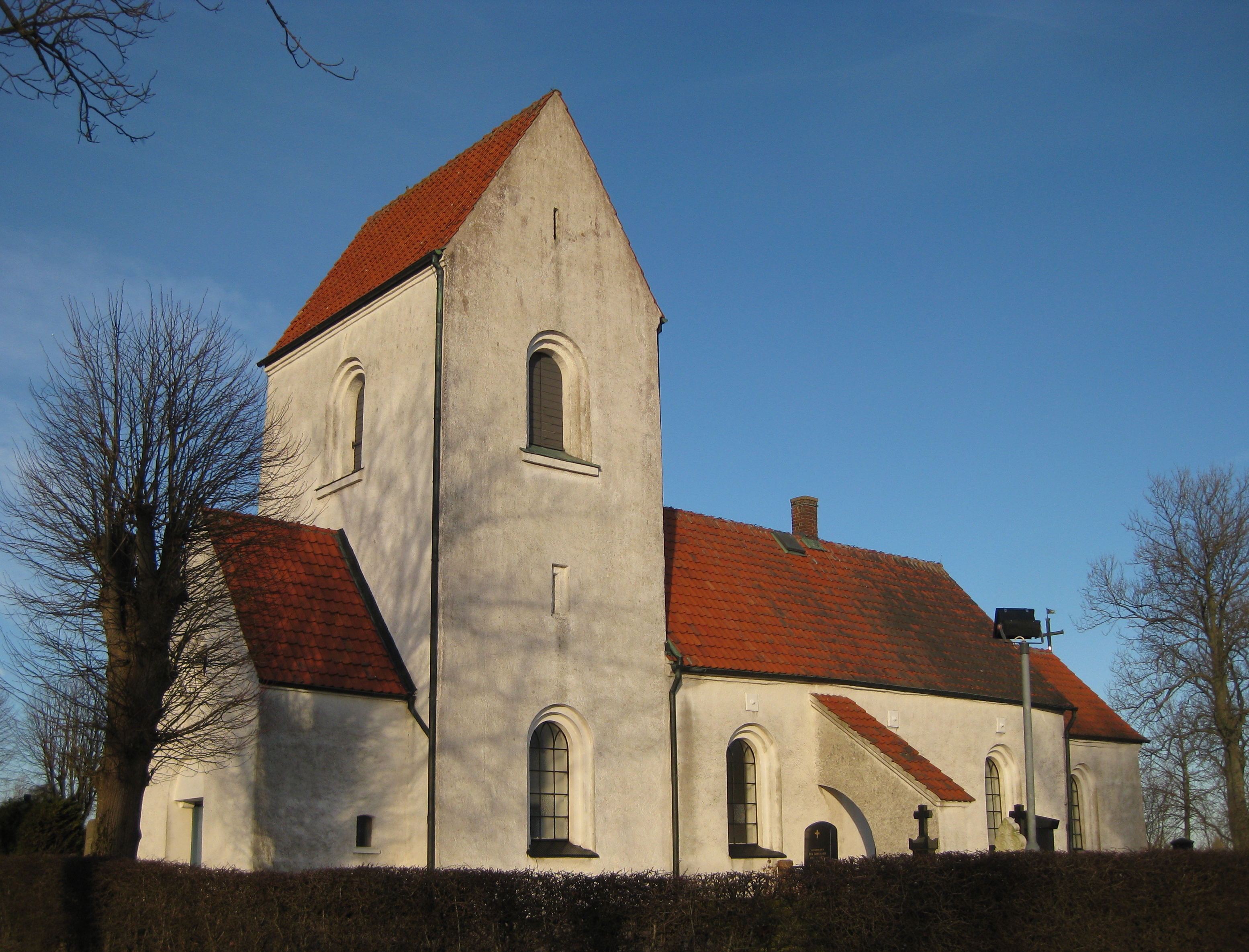 Bonderups kyrka i Skåne